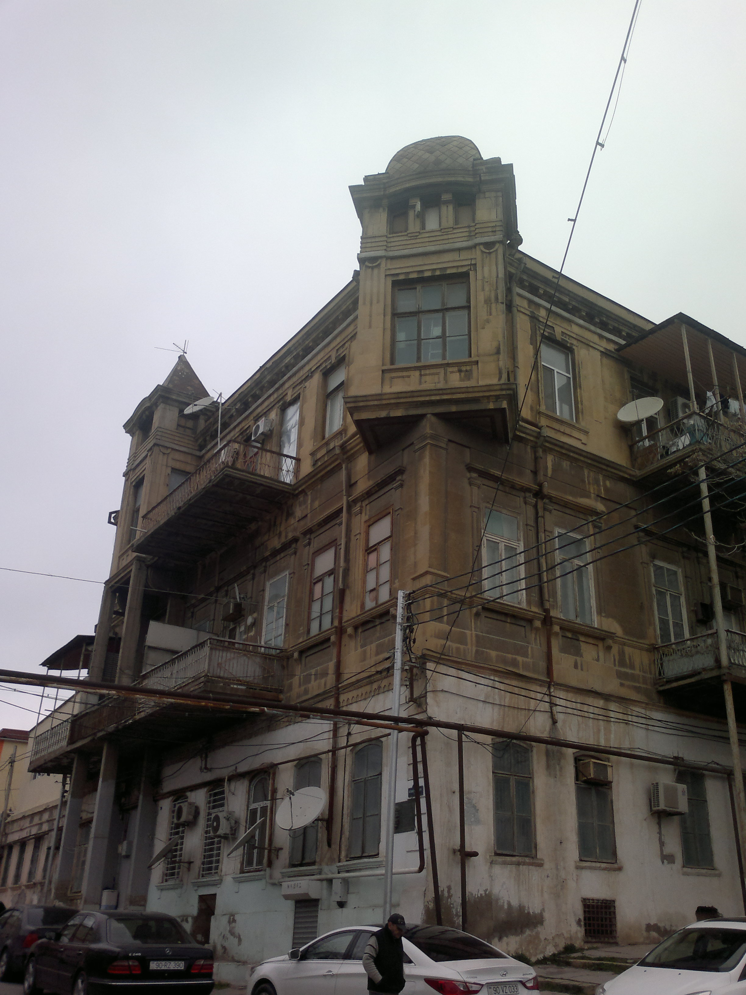 Building on Alibaba Abdullayev Street 7